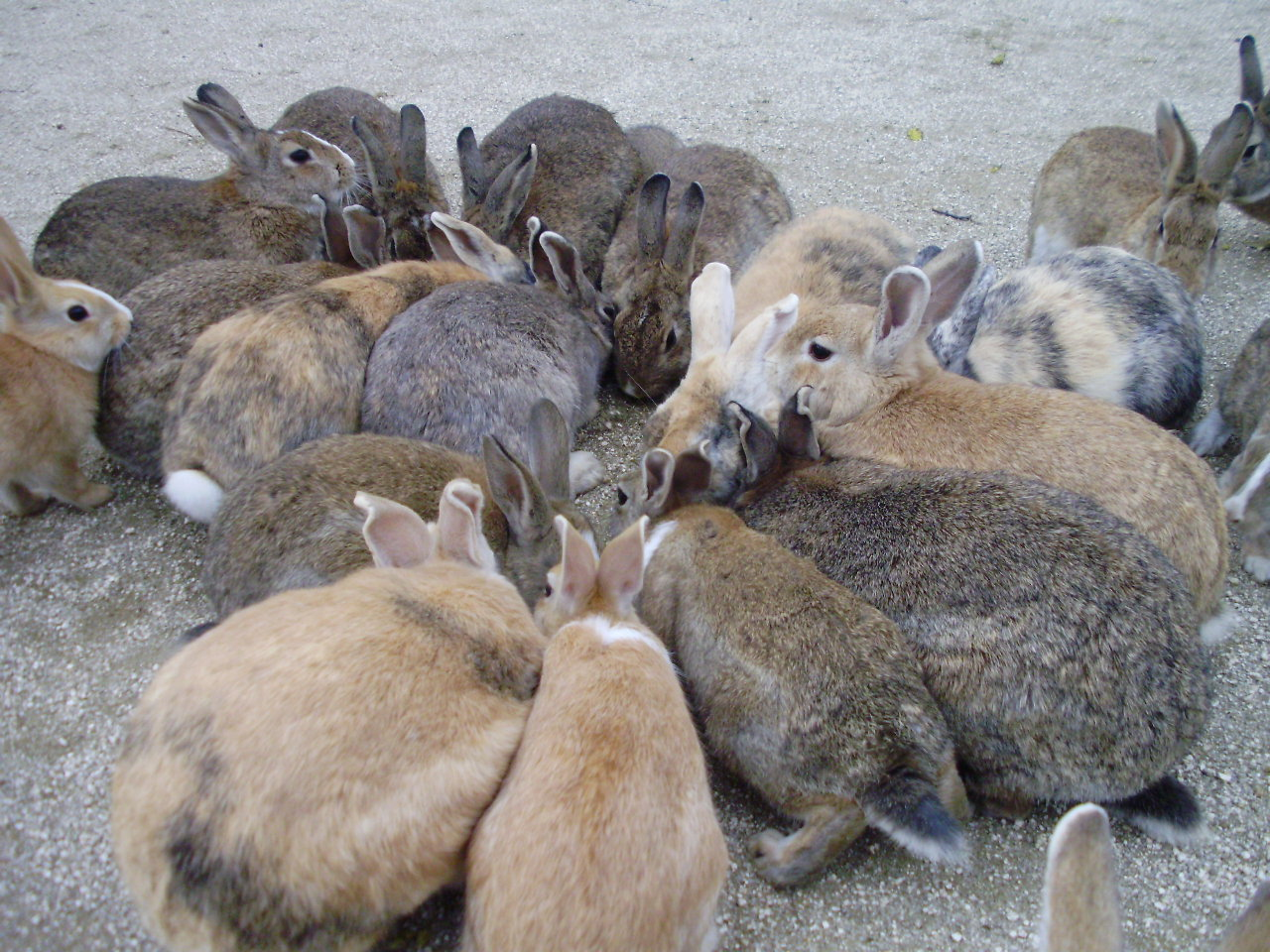 餌に集まった大久野島のうさぎ